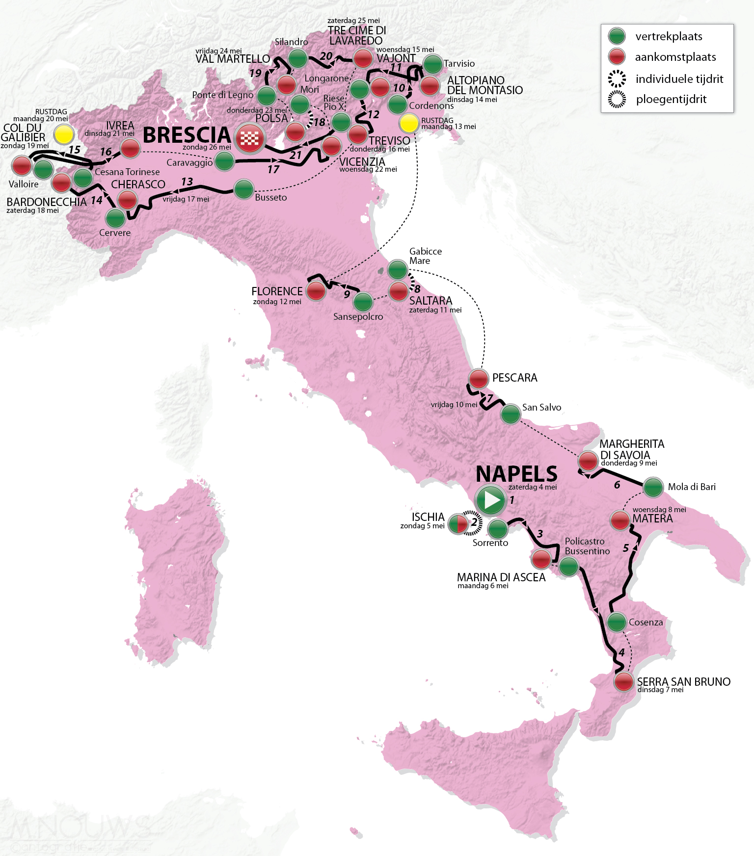 Parcours van de 96ste editie van de Giro d'Italia in 2013